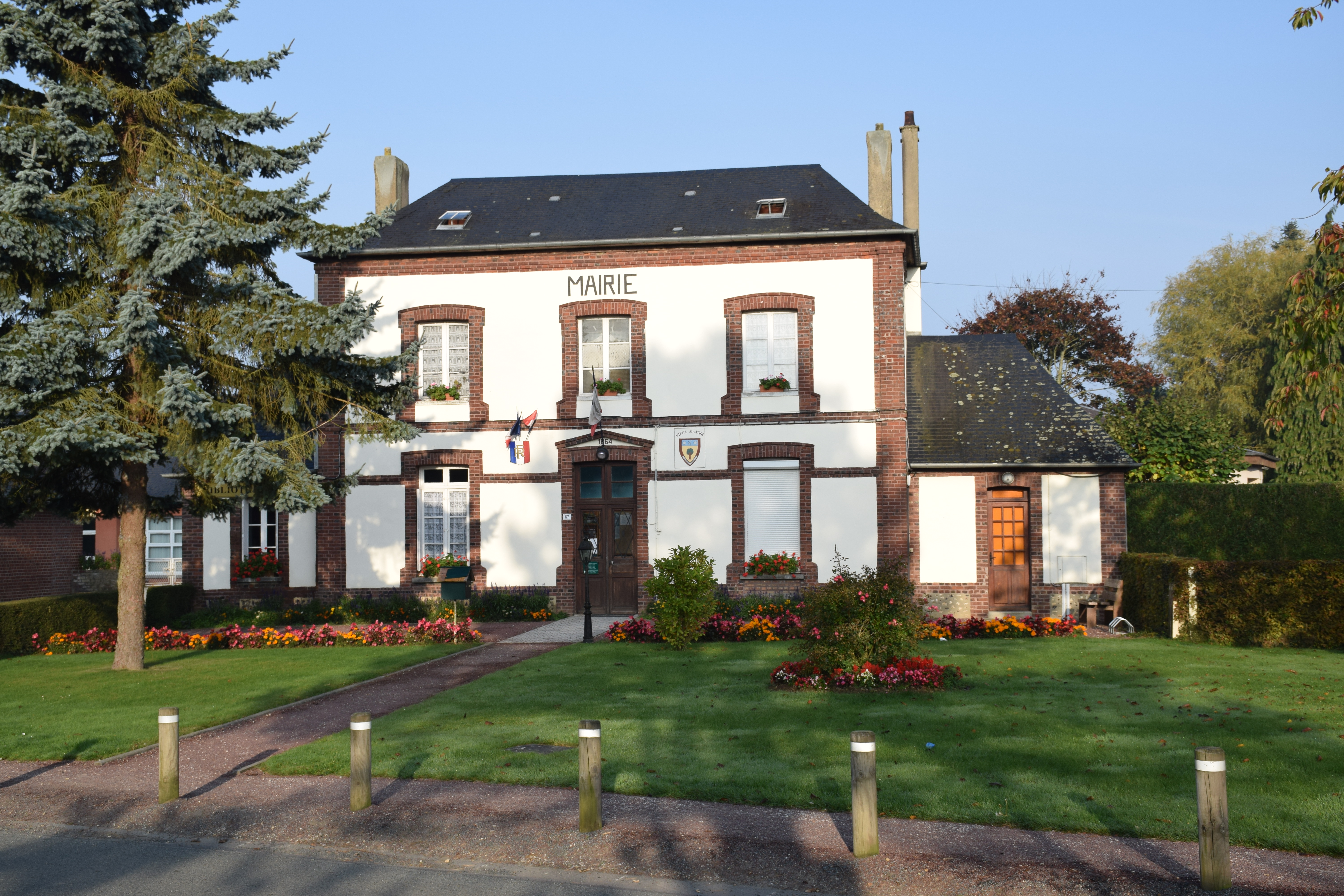 Mairie